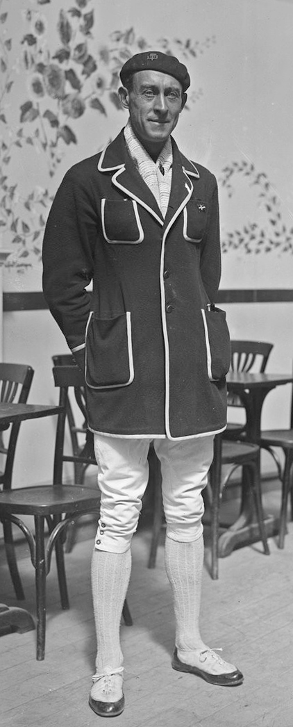 Heidé, Norvège [escrimeur, Luna Park, championnat d'Europe d'escrime, 16-17 juin 1922] : [photographie de presse] / [Agence Rol]